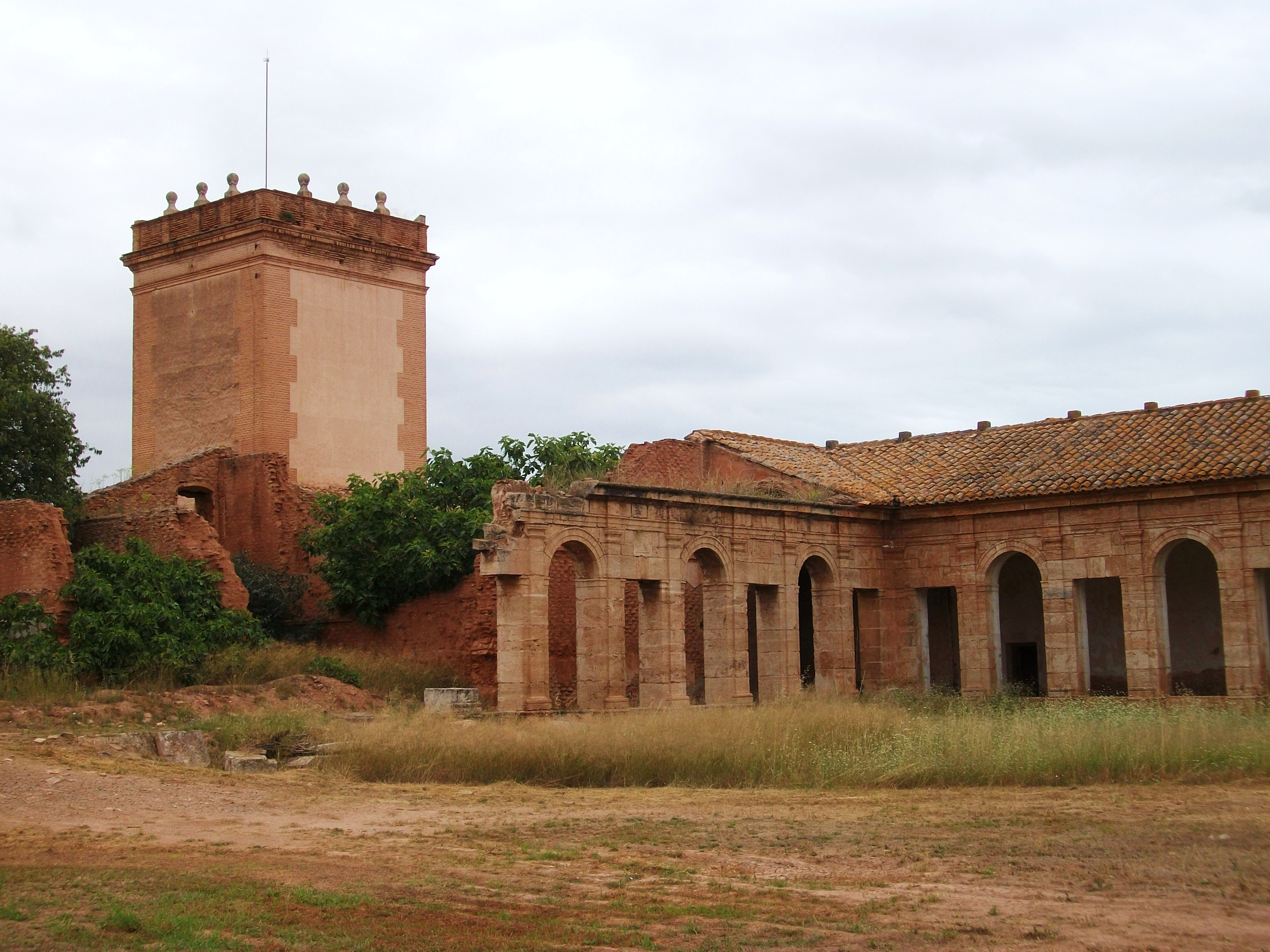 Torre al claustre major de la cartoixa d'Ara Christi.